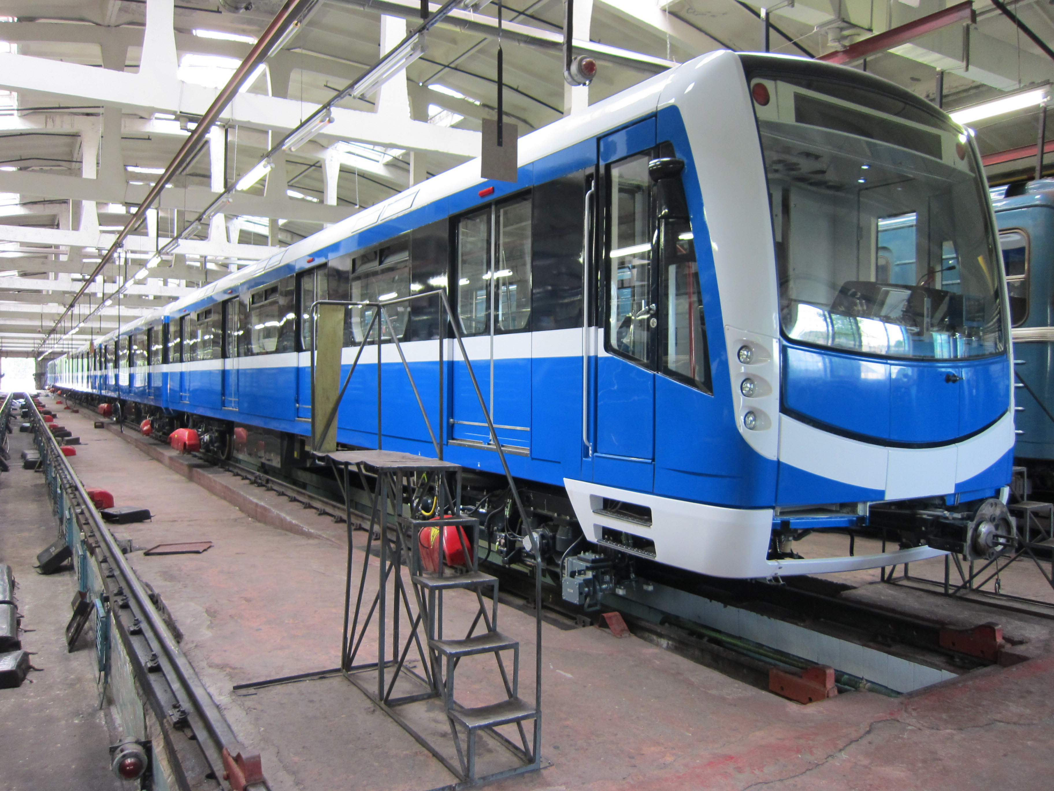 Поезд метро НеВа в депо Невское. Снимок сделан в день, когда был впервые из данных вагонов был сформирован 6-вагонный поезд